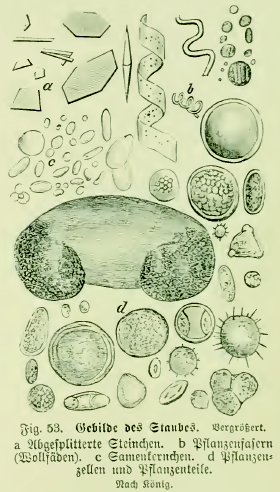 Fig. 53. Gebilde des Staubes. Vergrößert. a Abgesplitterte Steinchen. b Pflanzenfasern (Wollfäden). c Samenkernchen. d Pflanzenzellen und Pflanzenteile. Nach König.